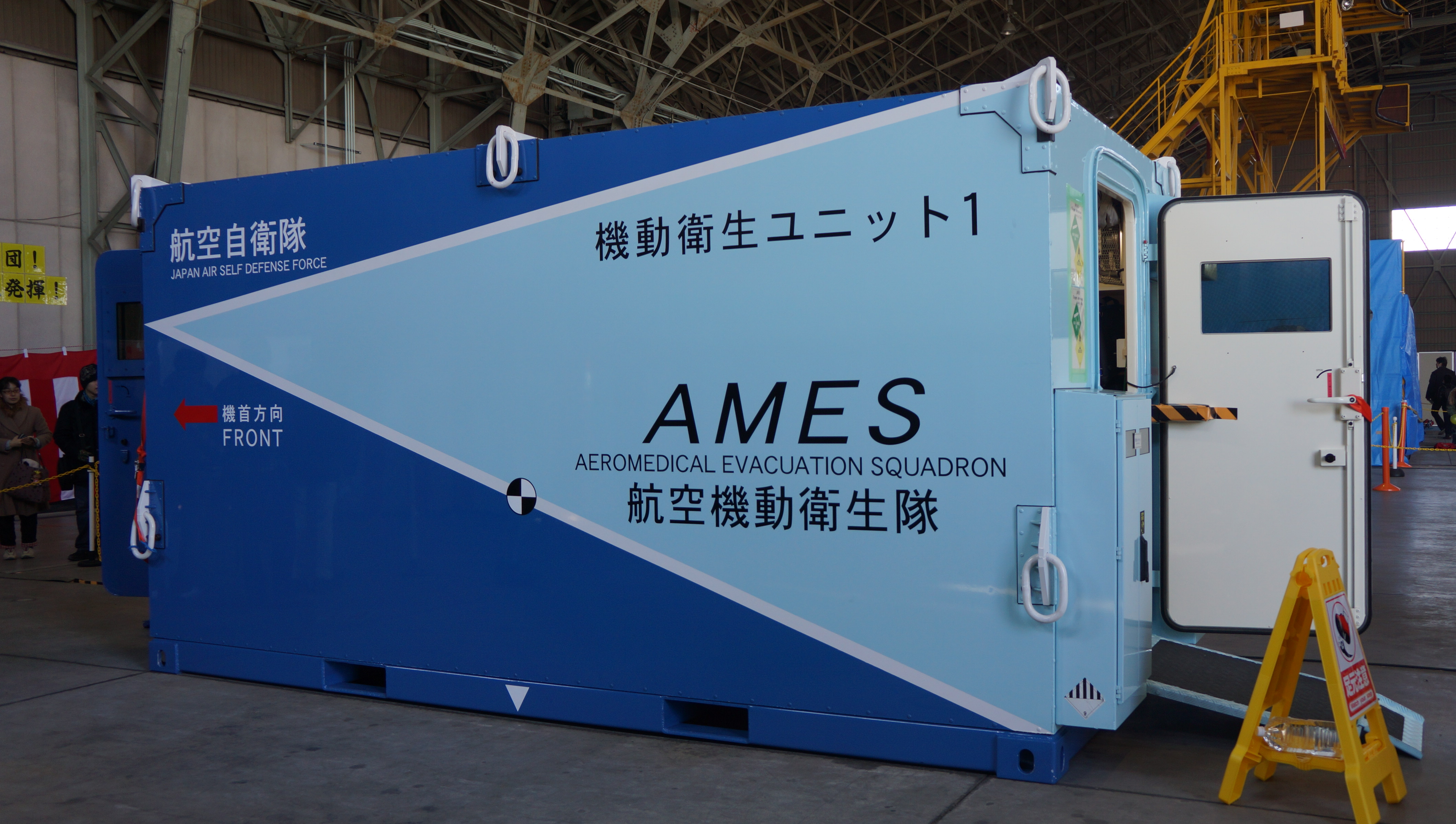 航空自衛隊 機動衛生ユニット 左後部。2014年2月23日 航空自衛隊小牧基地にて。